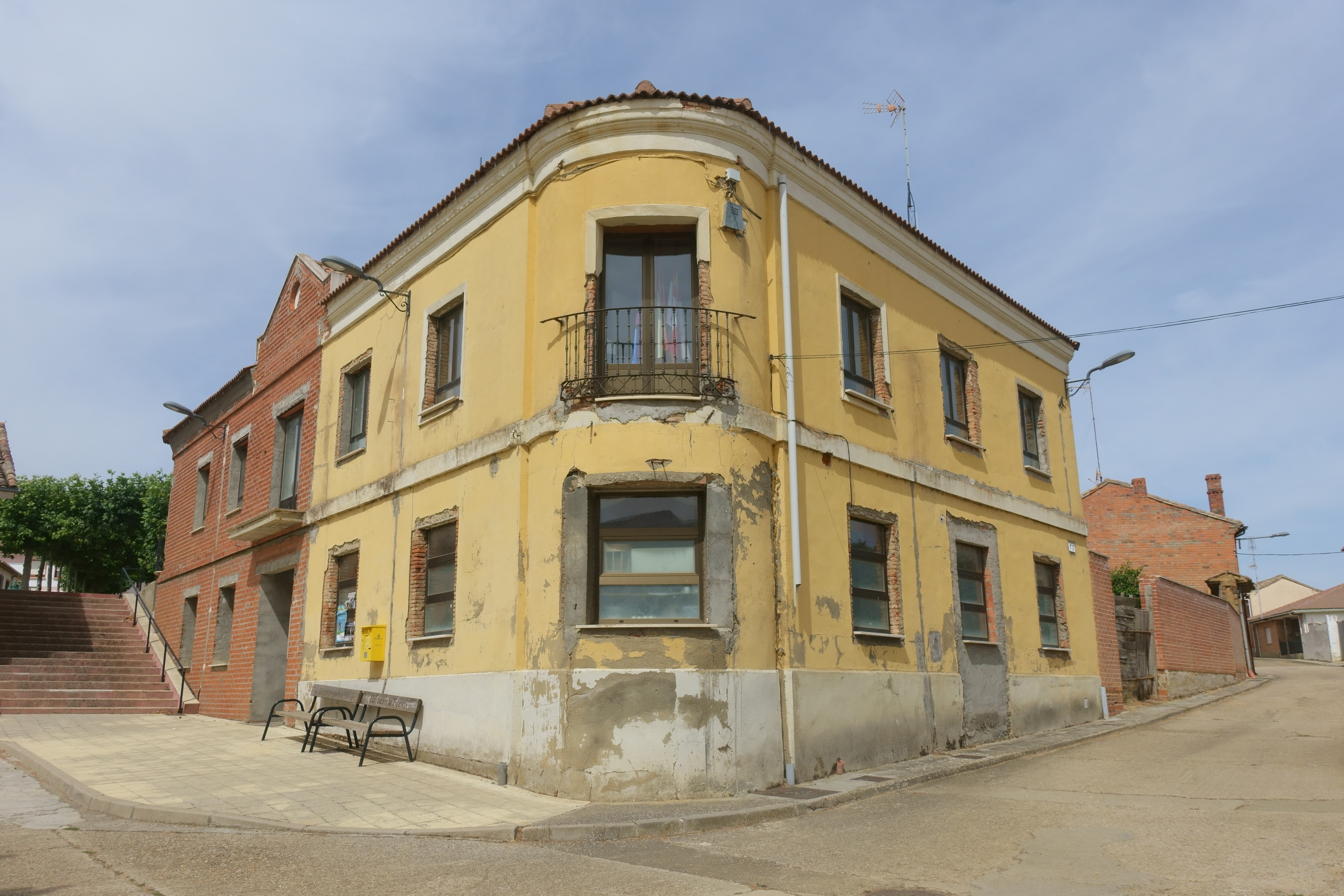 Casa consistorial de Villalcón (Palencia, España).